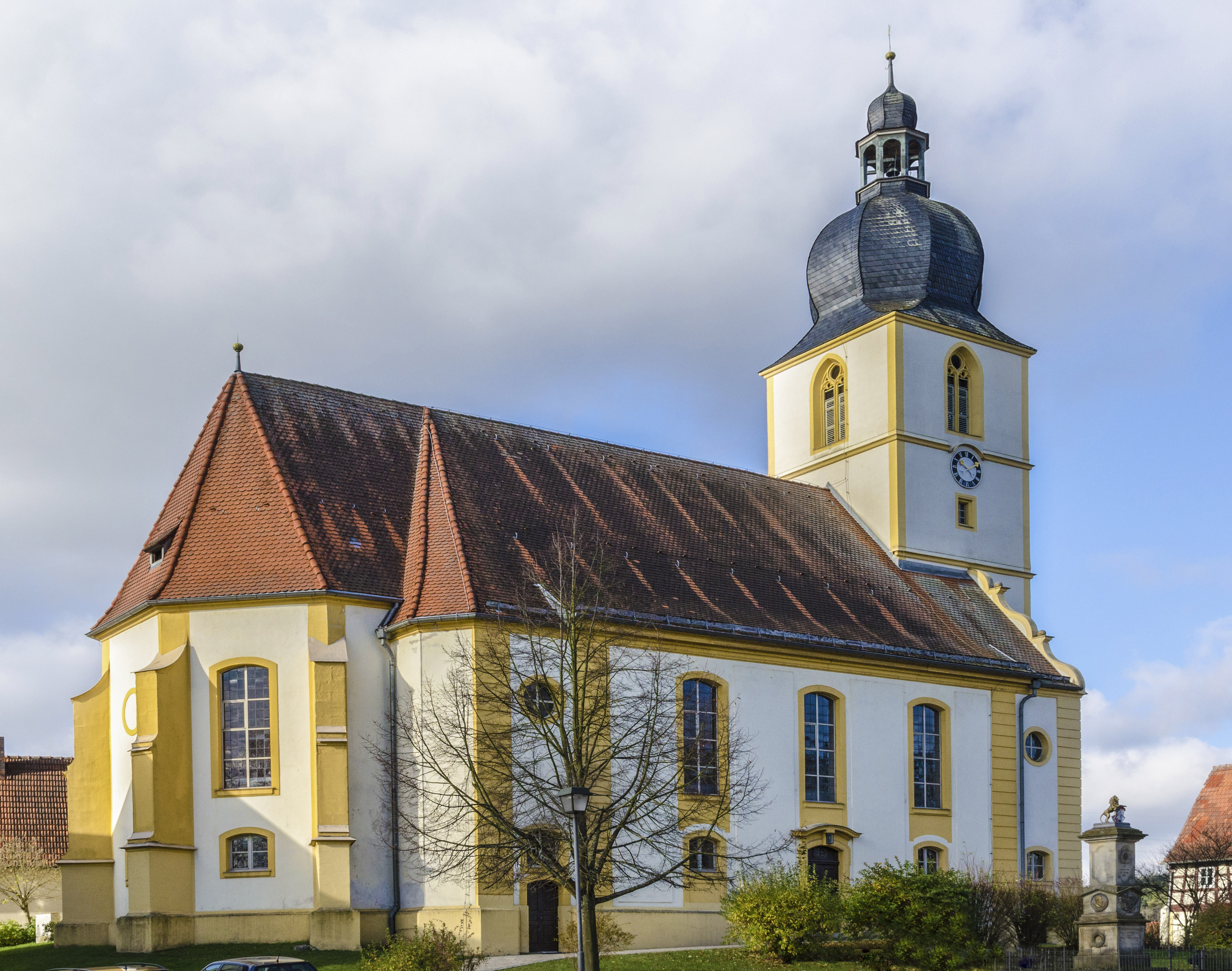 Rentweinsdorf, Dreieinigkeitskirche